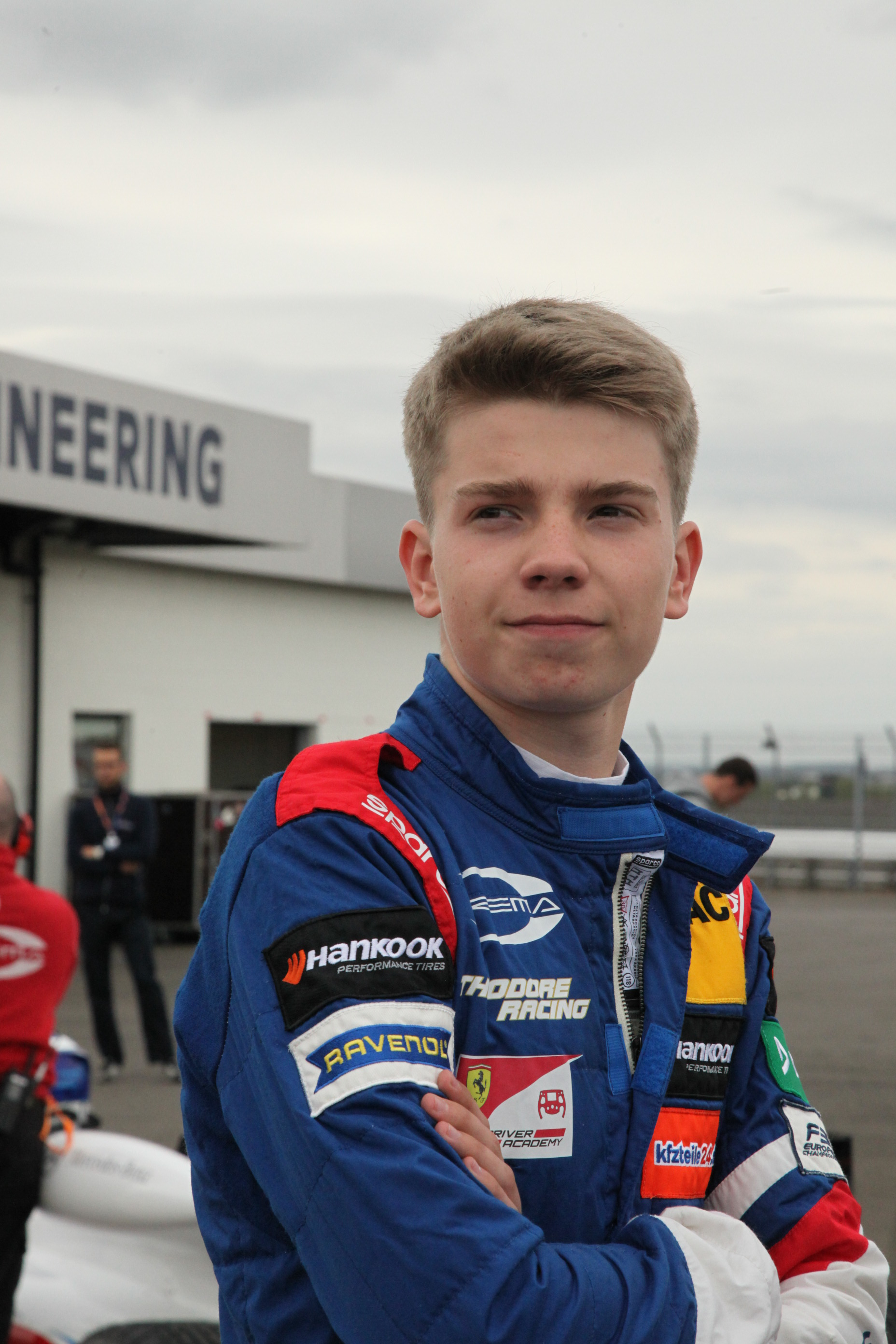 Роберт Шварцман (род. 1999) — российский автогонщик